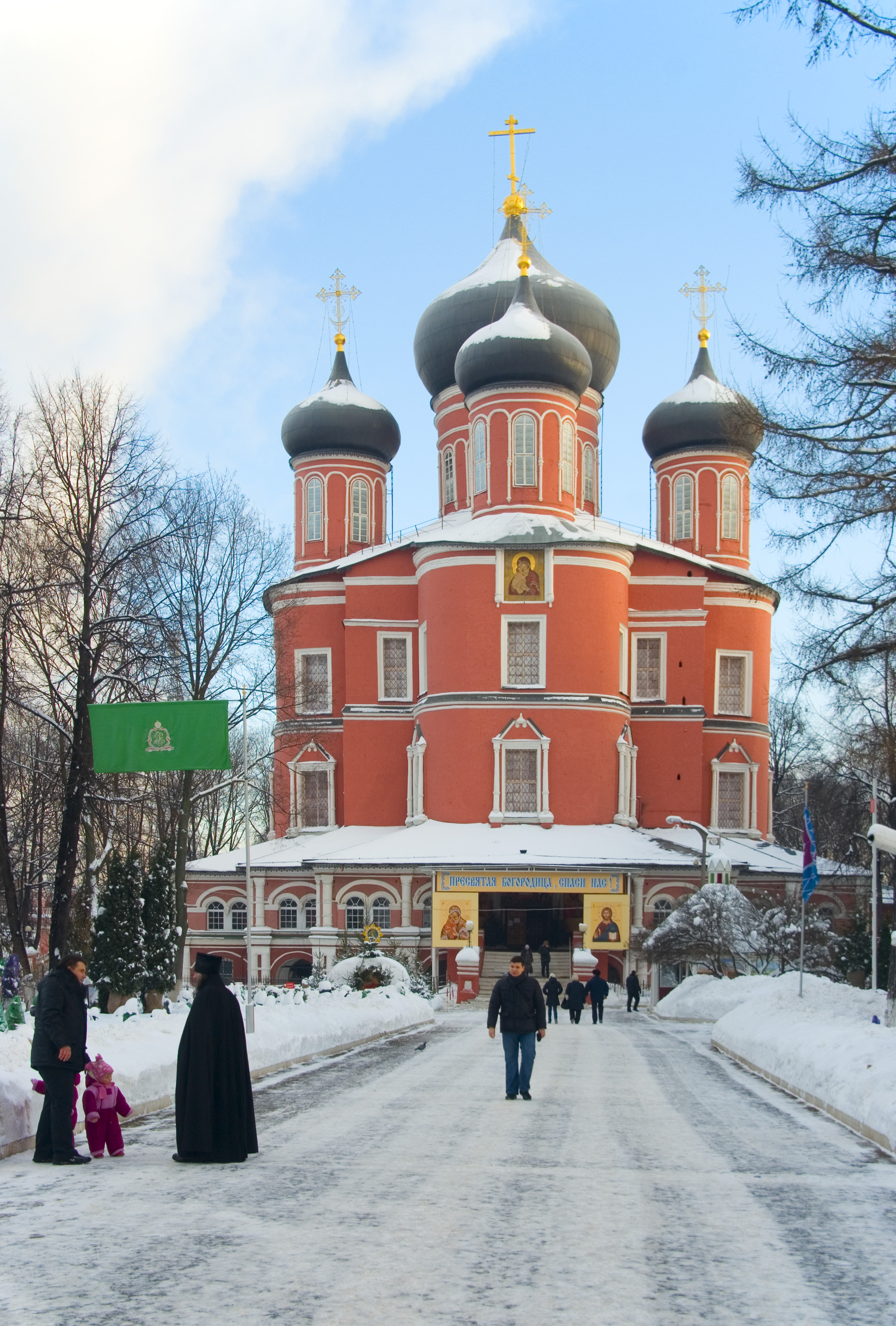 Монастырь Донской (Москва и Московская область, Москва, Донская площадь, 1)